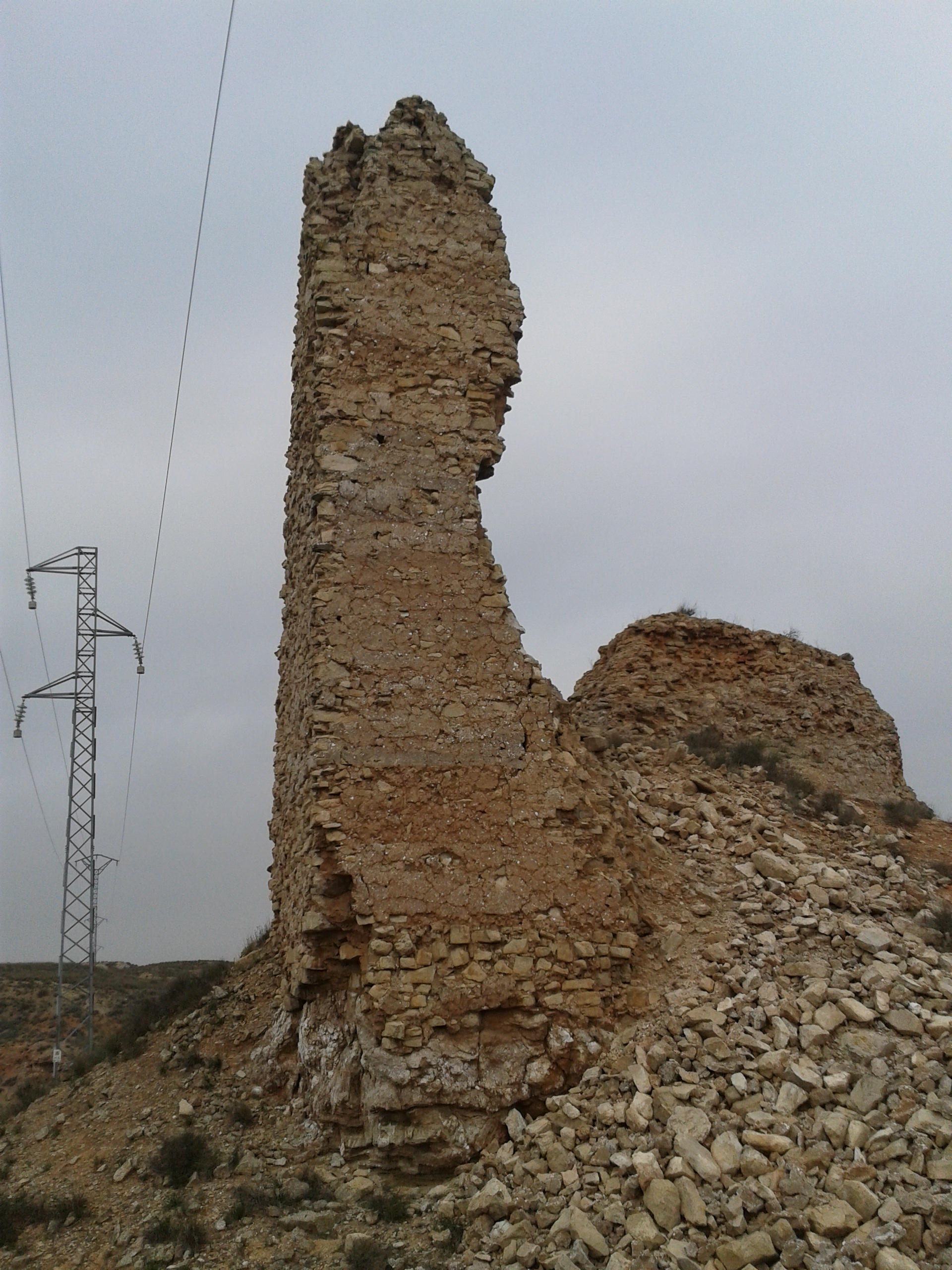 Restos del castillo de Matamala (Aragón, España)